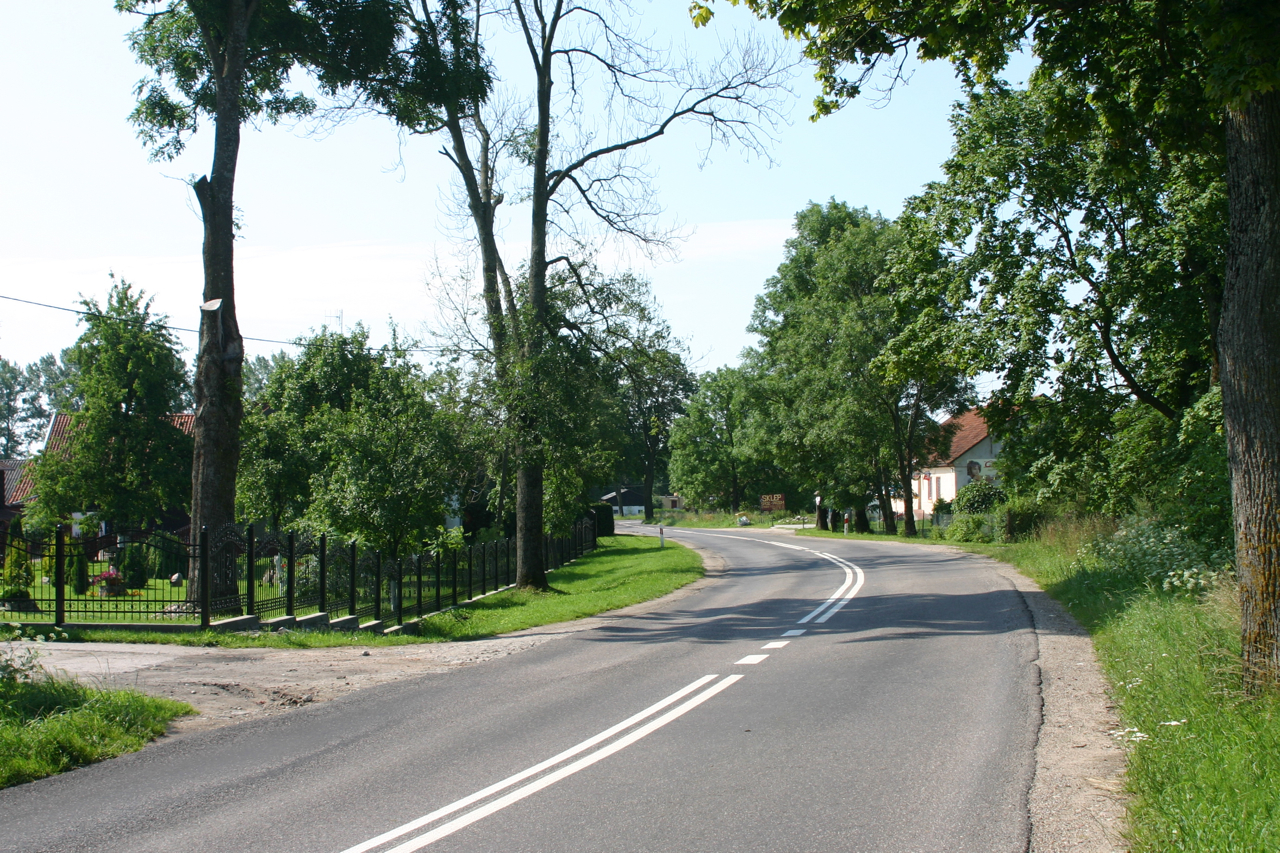 Pieckowo, Polska, powiat kętrzyński.